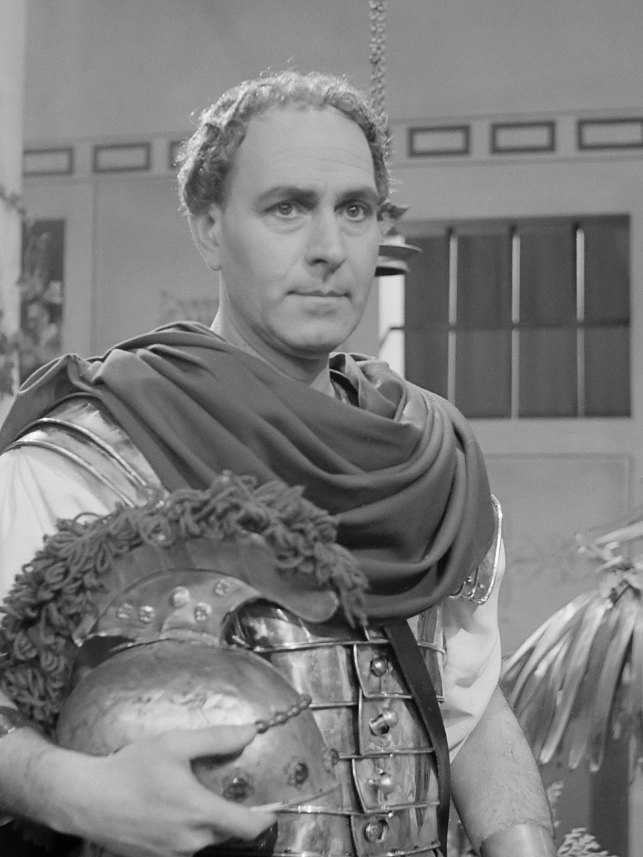 Televisiespel "Wachters bij het graf" , Johan Schmitz Marcus Tiberius 14 april 1960